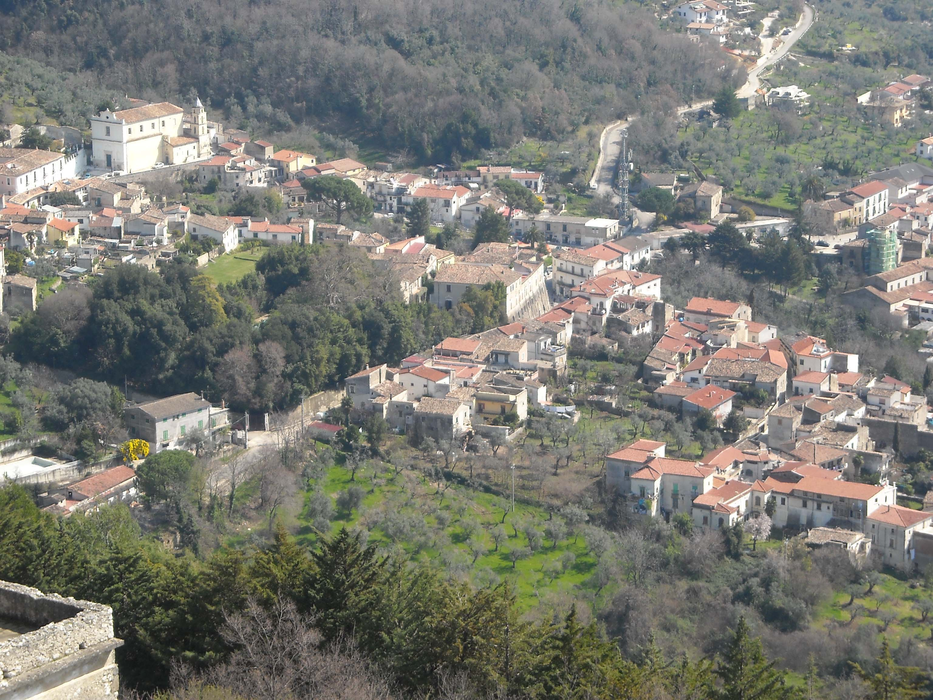 autore: Luigi Bruno Di Cosmo; fonte: opera propria; descrizione: Centro storico di S. Angelo d'Alife visto dal castello di Rupe Canina. Licenza d'uso: Pubblico dominio